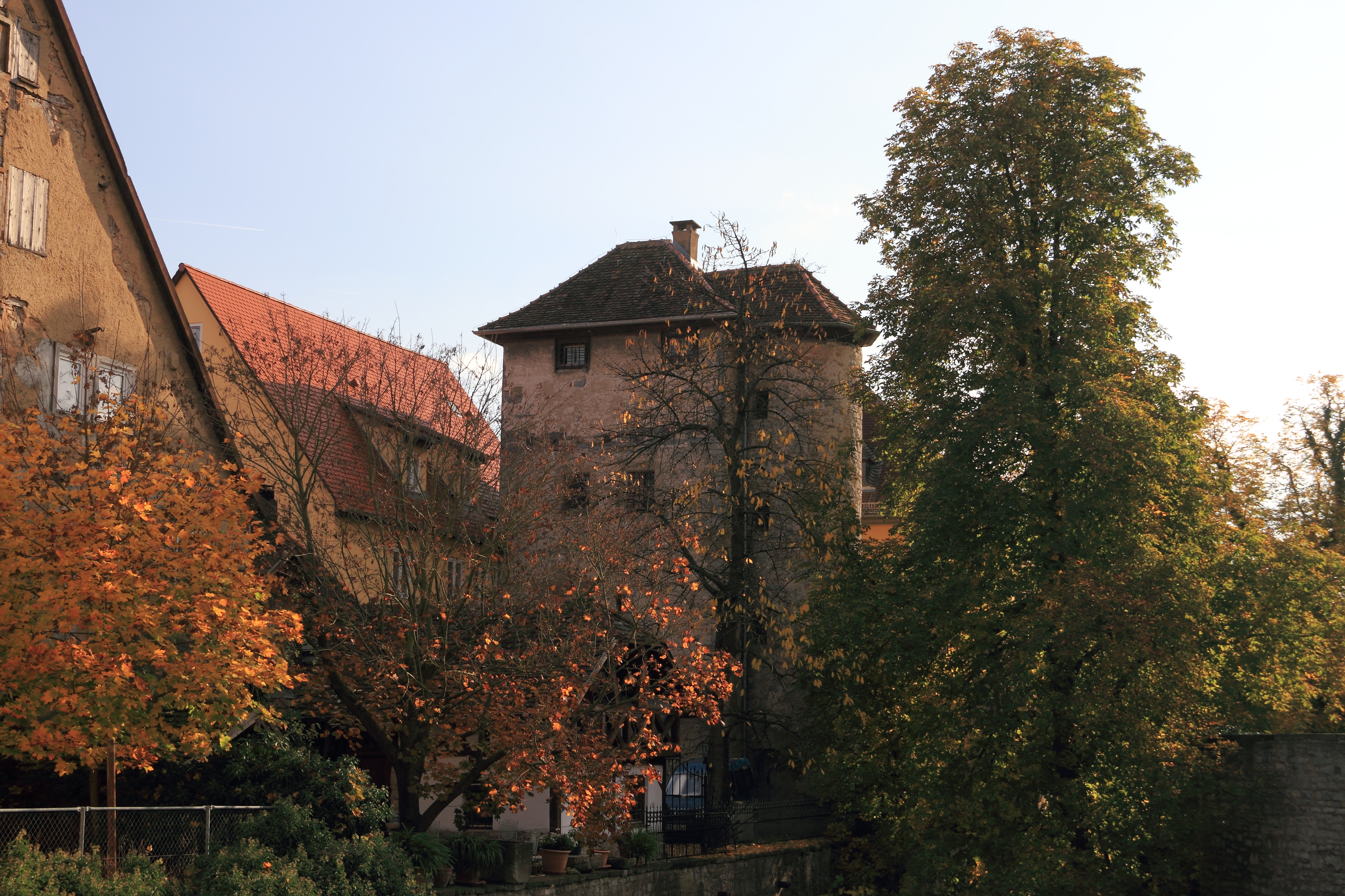 Das ehemalige Stadtgefängnis Blaue Kappe von der Schlossbrücke gesehen.